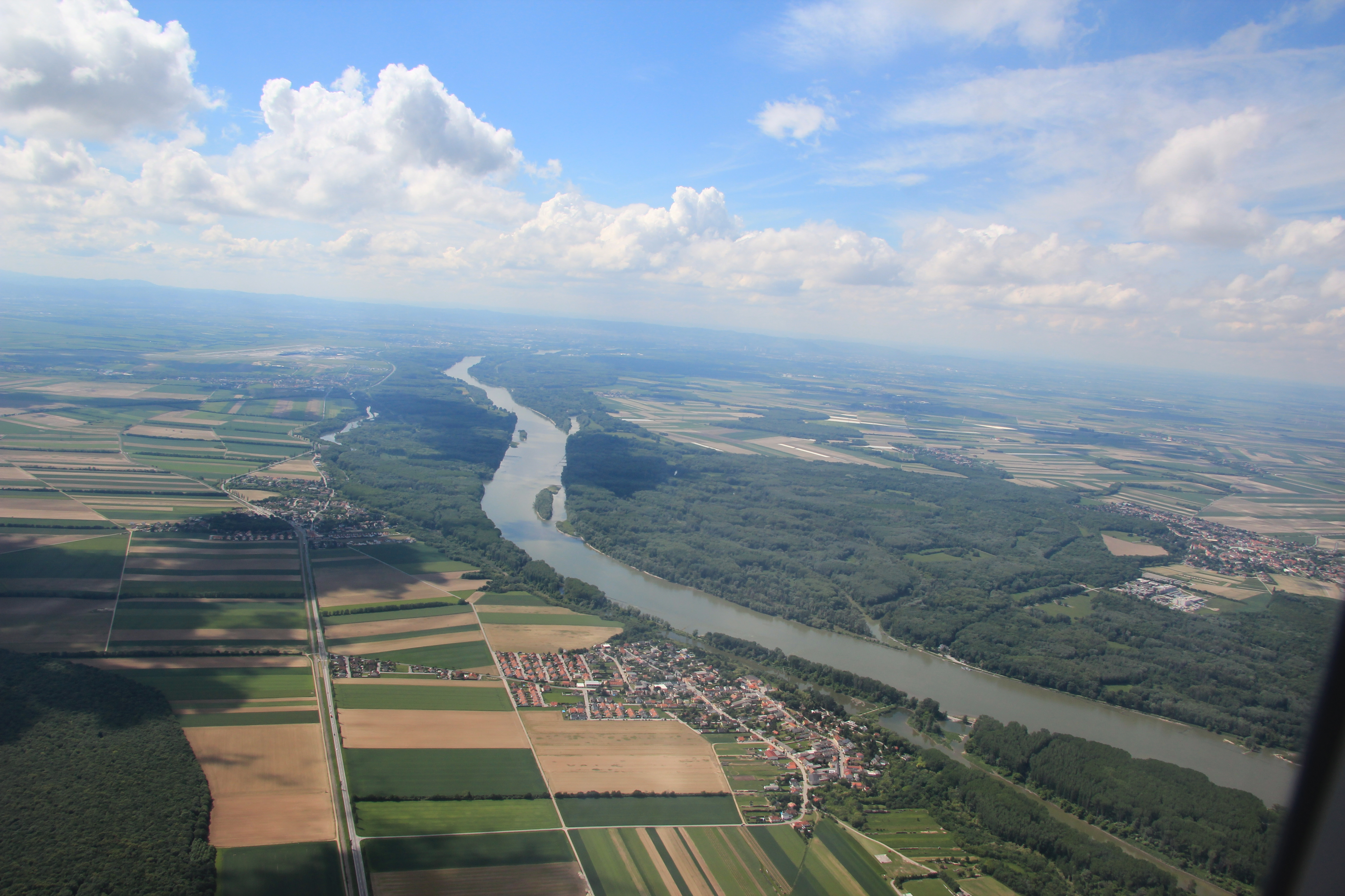 Donau östlich von Wien mit Nationalpark Donauauen